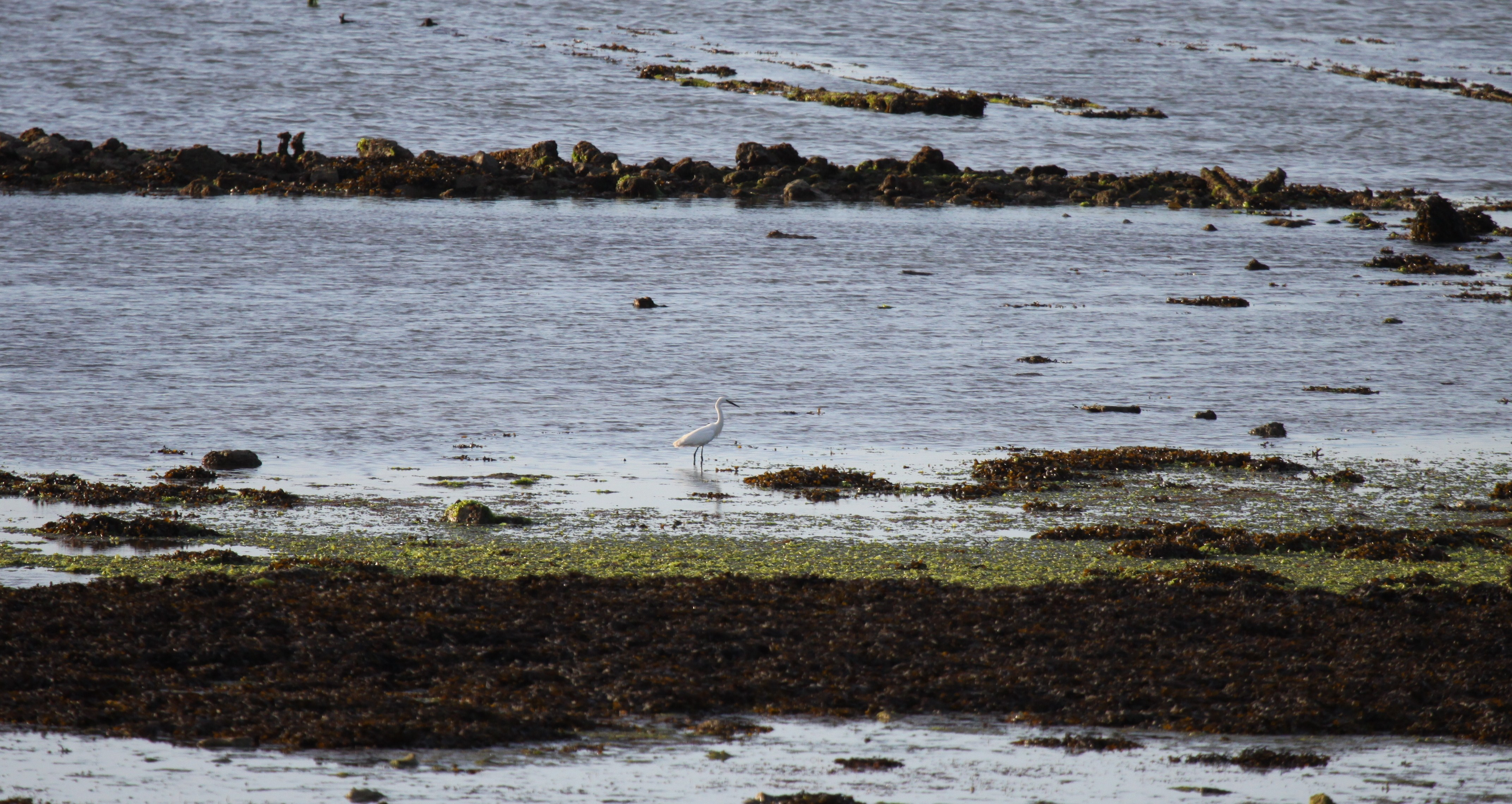 Près de Saint-Martin-de-Ré, sur l' estran et dans une écluse à poissons en ruine, une aigrette garzette est en train de chercher de la nourriture. Une écluse à poissons est un piège pour les poissons. Elle est constituée d' une surface de l' estran entourée par une murette aménagée de claies (évacuations munies de grilles pour l'écoulement de l' eau). Lorsque la mer est descendue au niveau du sommet de la murette, les poissons qui sont encore à l' intérieur de l' écluse sont pris au piège, ils ne peuvent plus repasser au dessus de petit mur. Au fur et à mesure que la mer baisse, l' eau dans l' écluse s' évacue, de la sorte, il est plus facile de ramasser les poissons prisonniers. Dans l' Île de Ré cette technique de pêche est abandonnée depuis déjà plusieurs dizaines d' années. Saint-Martin-de-Ré, Île de Ré, Charente Maritime, France.